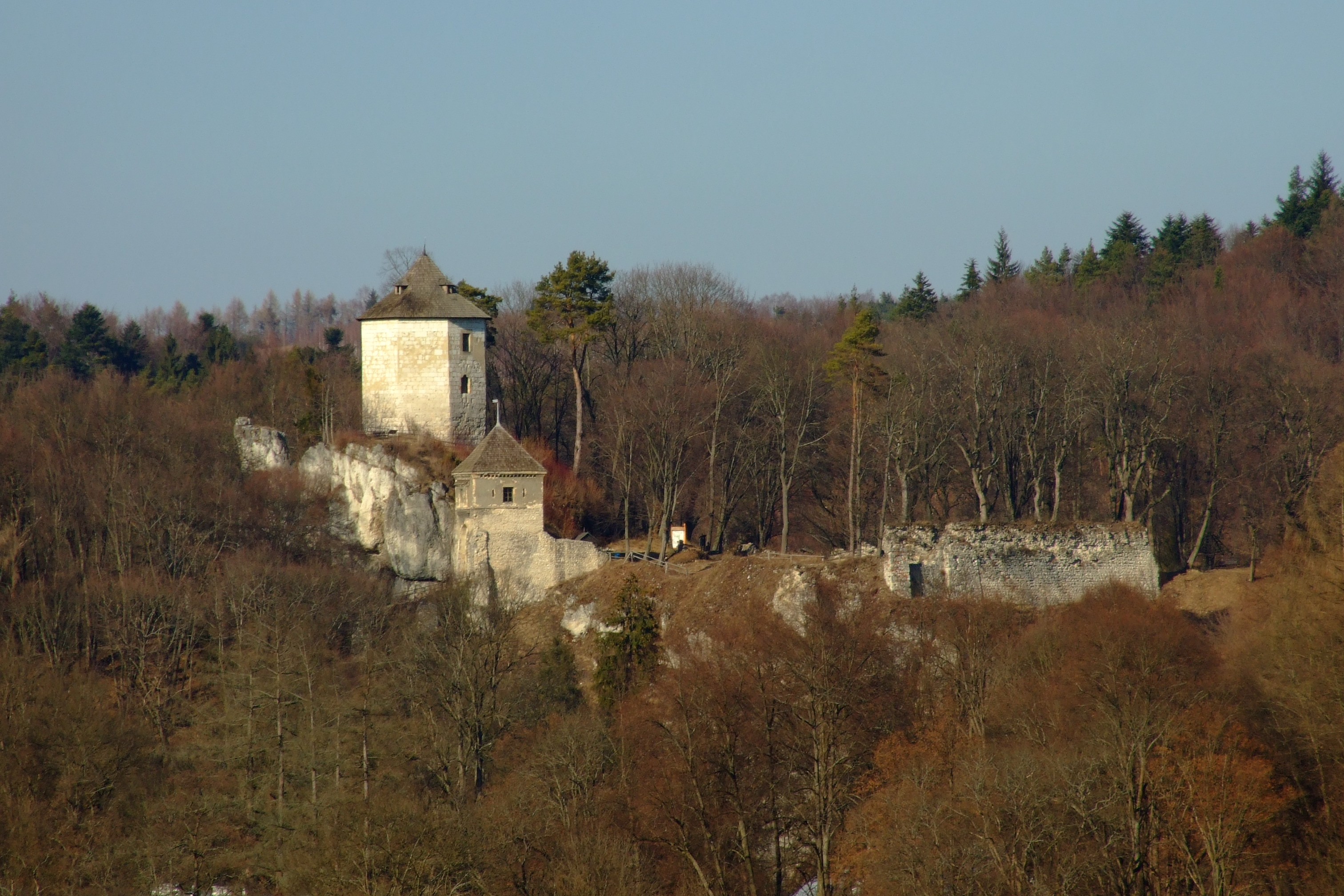 Zamek w Ojcowie